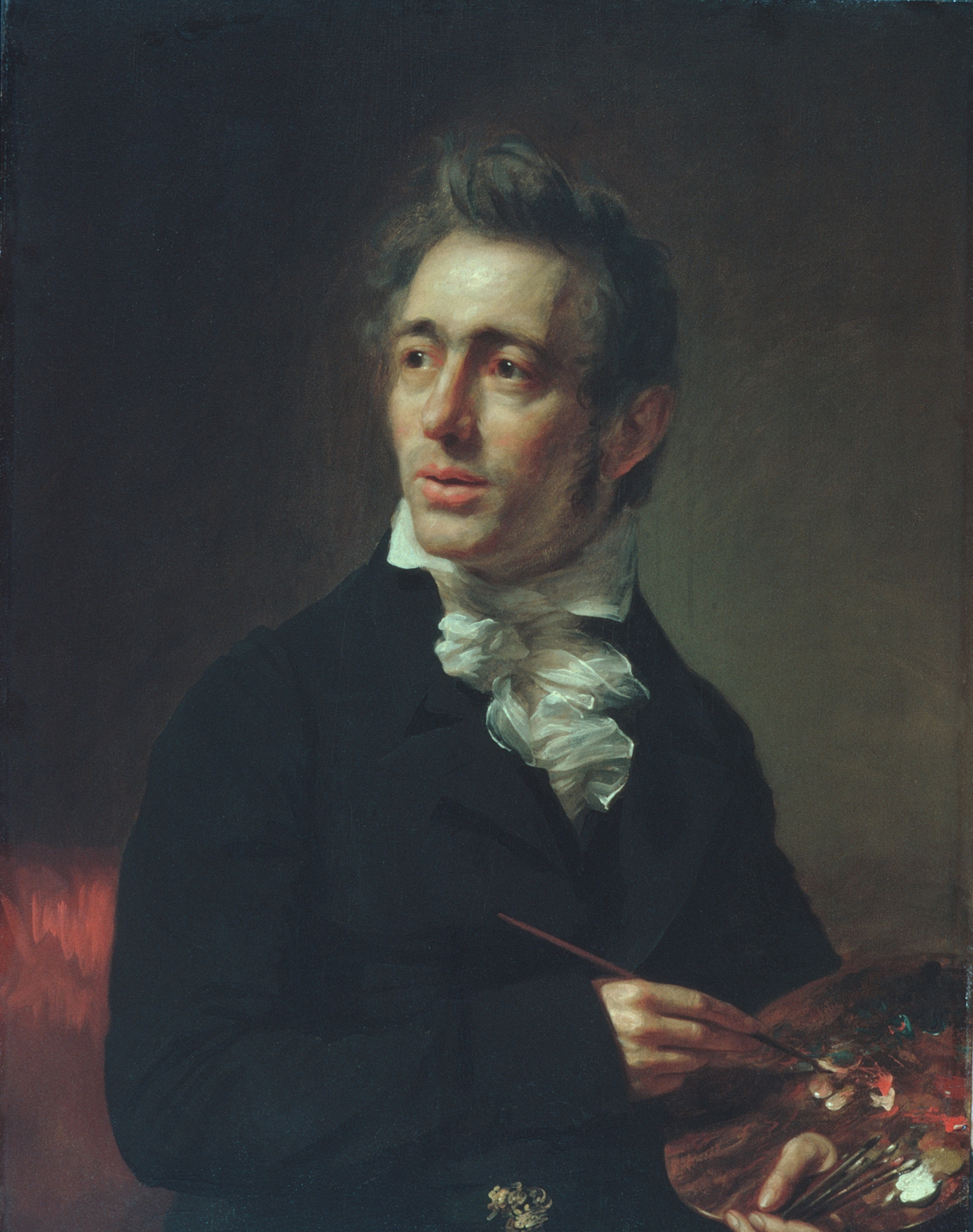 Self-portrait